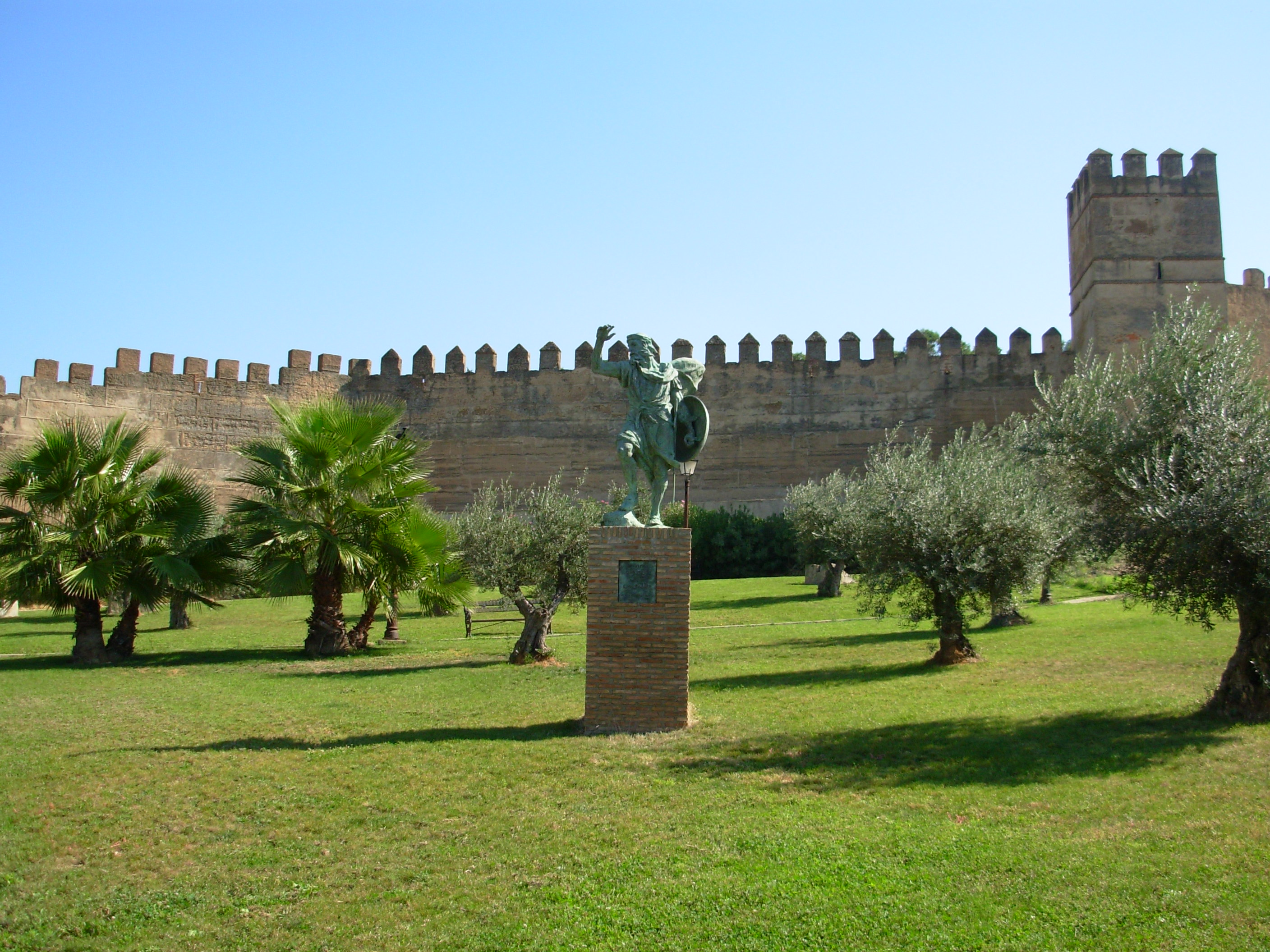 Ibn Marwan en la Alcazaba de Badajoz